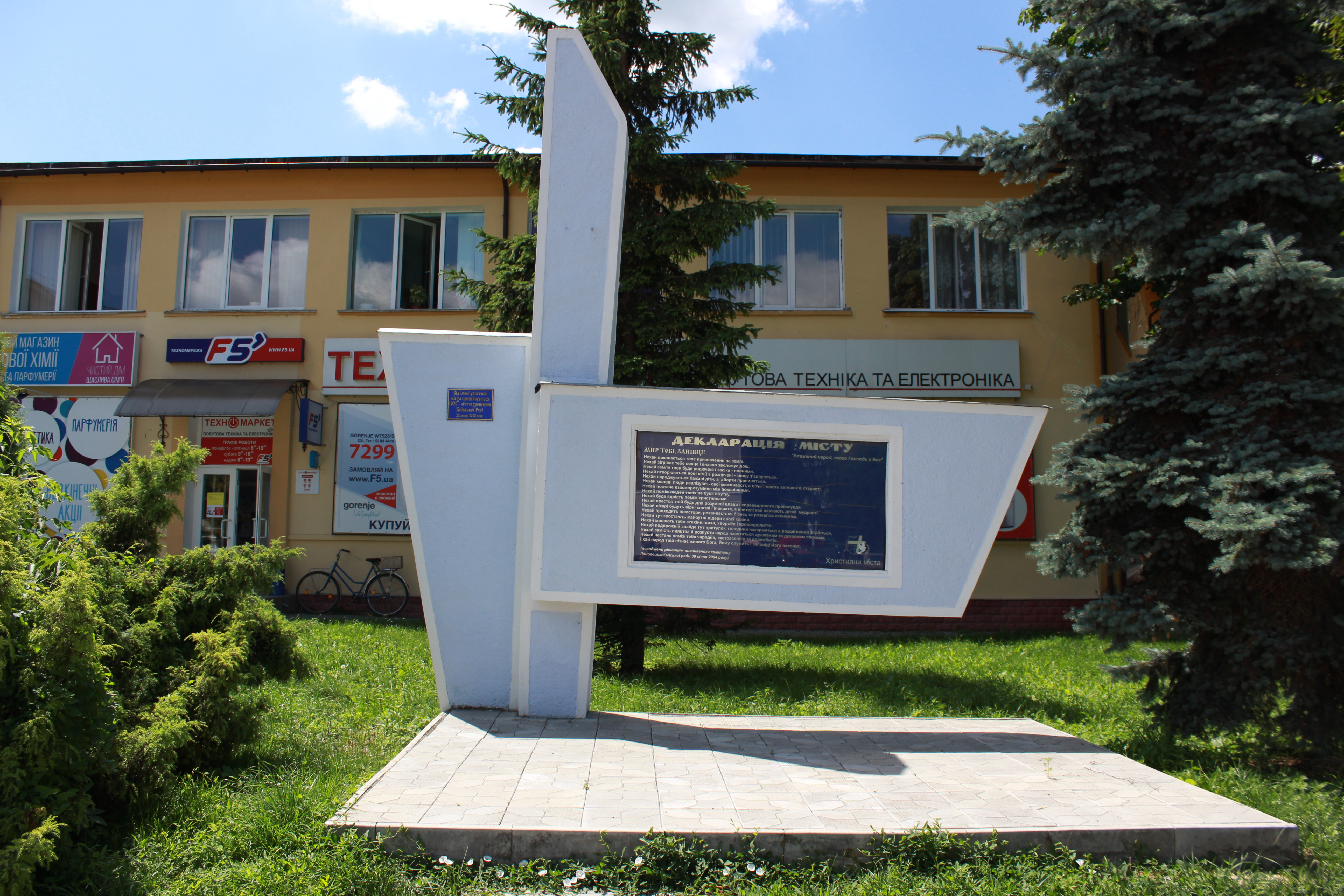 Пам'ятний знак на честь 1020-річчя хрещення Київської Русі - "Декларація місту", Ланівці, вул. Шкільна